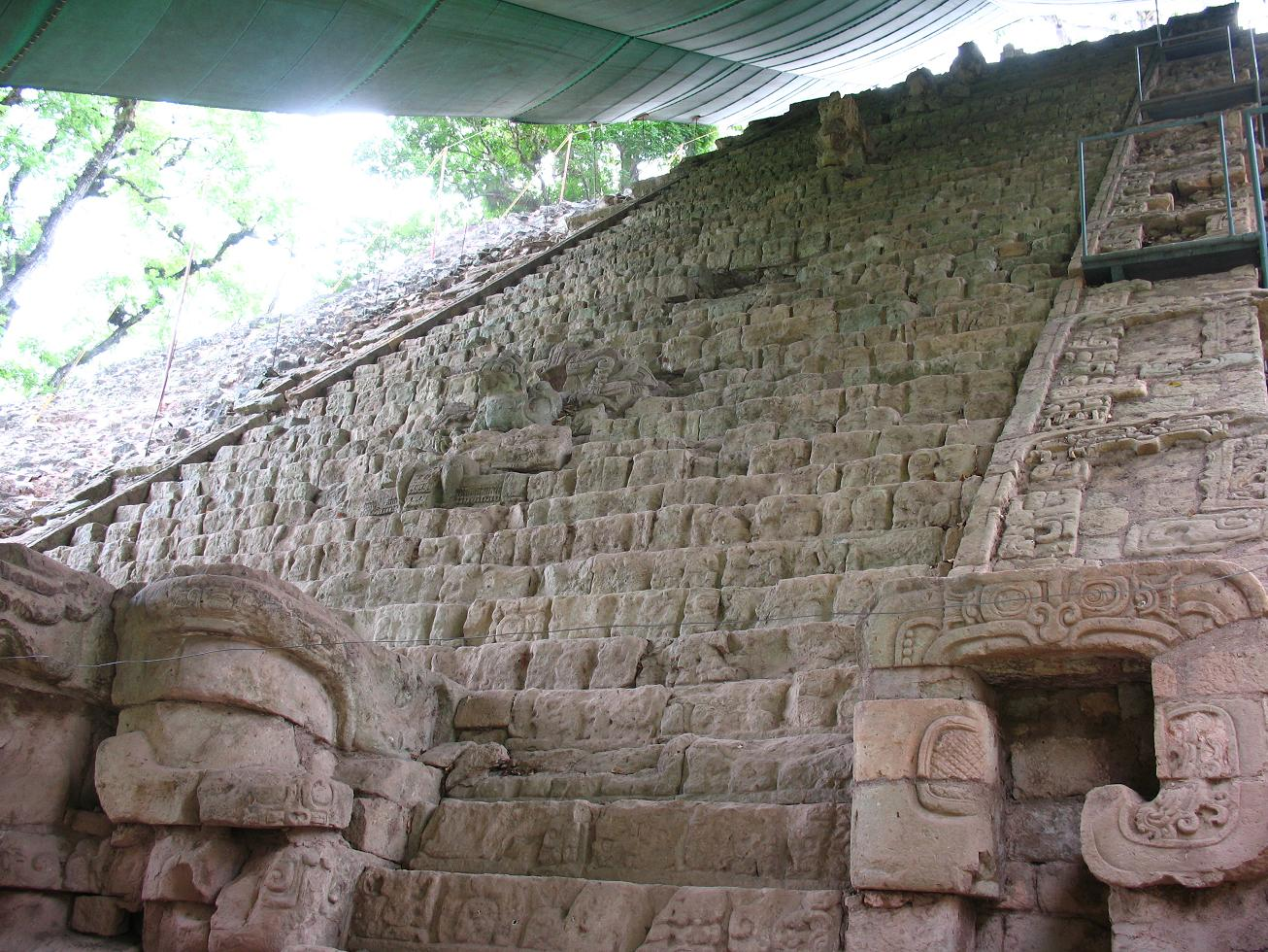 Escalinata de los jeroglíficos en Copán (Honduras)